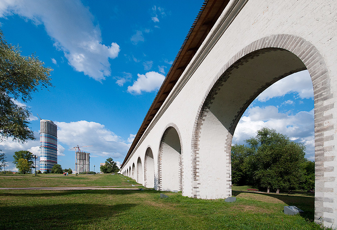 Акведук через реку Яузу (Москва и Московская область, Москва, Мира проспект, 186-188)